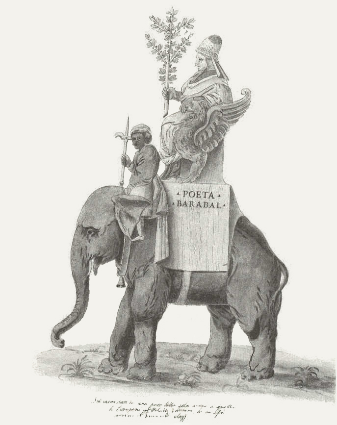 Hanno mit Baraballo auf dem Rücken